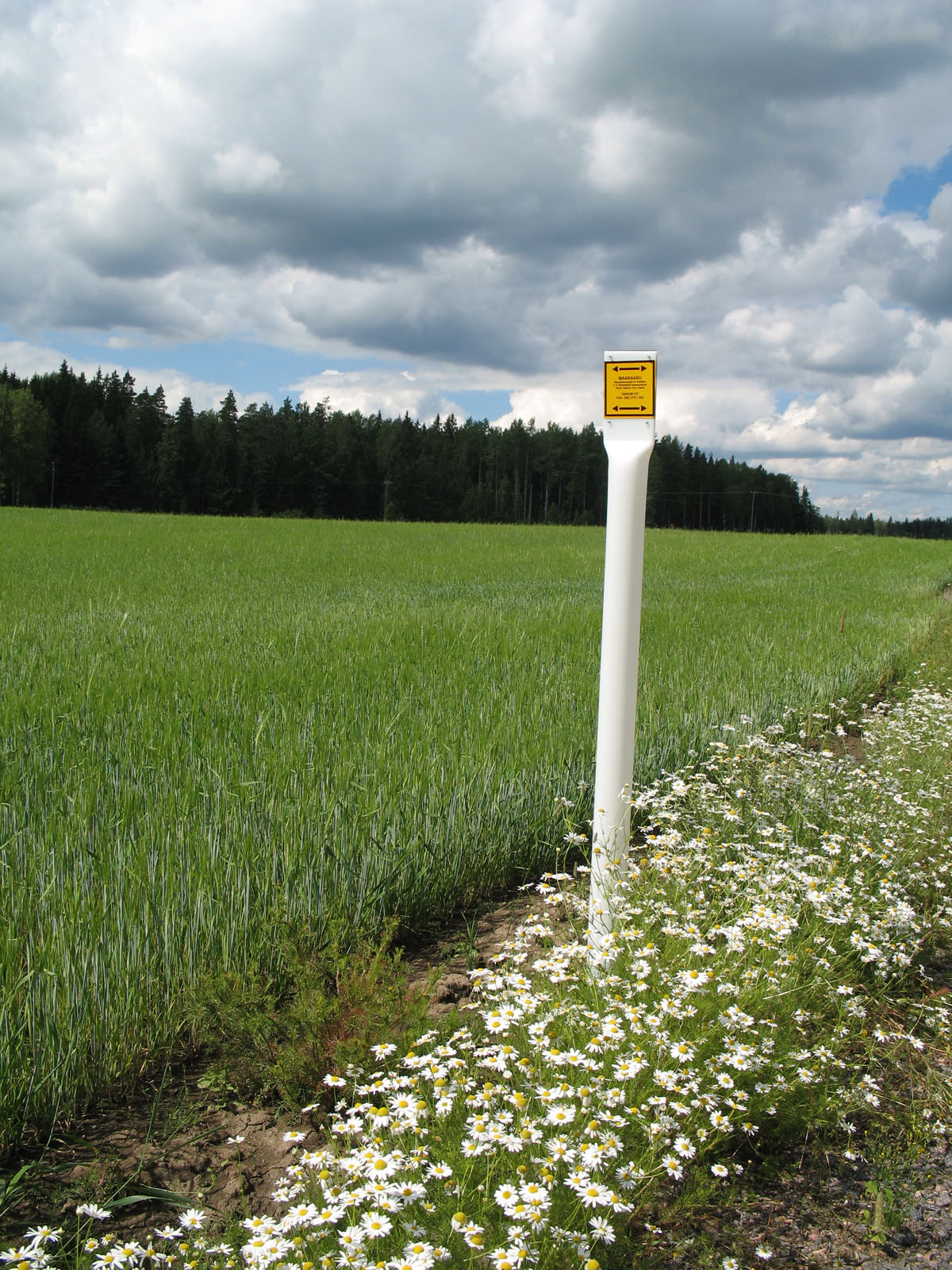 Maakaasulinjasta kertova merkki, Suomi, 2007. Merkistä kuuluu ilmetä sekä kaasulinjan omistajan että maanomistajan tiedot.